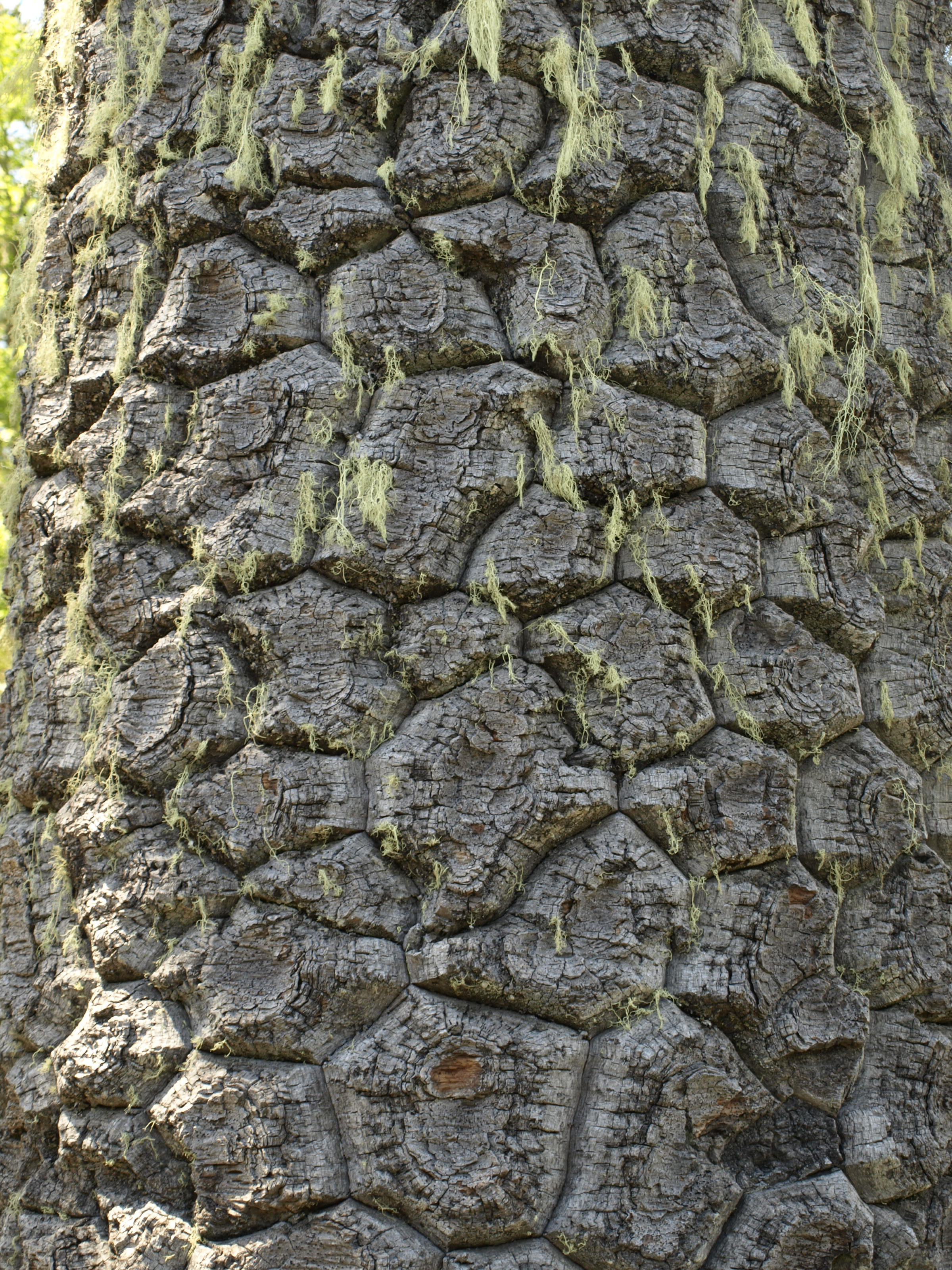 Parque Nacional Conguillío, Chile